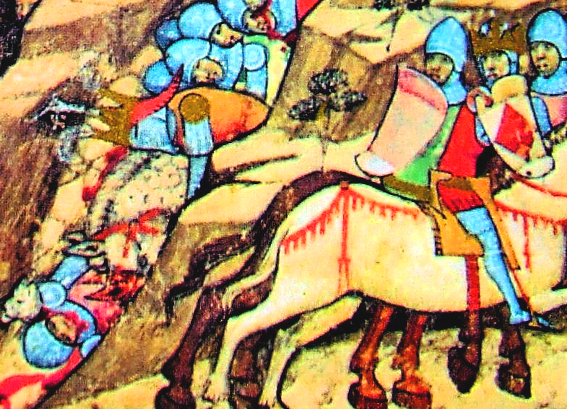 Posadai csata Károly Róbert 1330. évi havasalföldi hadjáratában Képes krónika illusztráció kivágása. A véres csata jelenete, a holtak között az átöltözött Dezső vitéz fején Anjou sisakdísz, páncélos holtteteme a lovával együtt fekszik a sziklagödörben„…kiitták a kegyetlen halál poharát, minthogy nyomorultul sújtották őket főbe, miniatúra a bécsi Képes krónika 143. lapján”